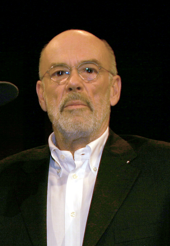 Bernd Fischerauer, österreichischer Regisseur, Schauspieler und Drehbuchautor